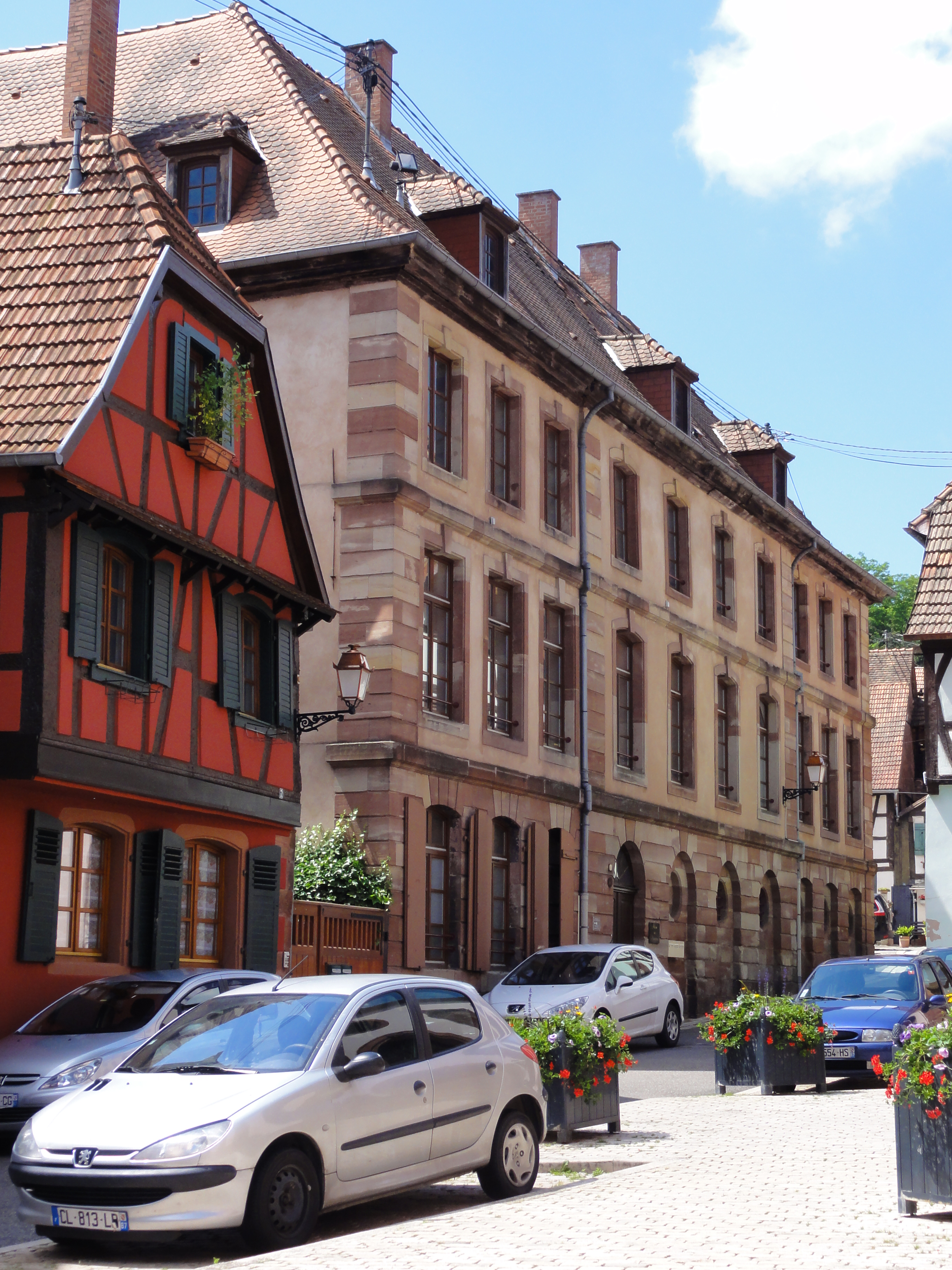 Alsace, Bas-Rhin, Bouxwiller, Ancien collège du Comté (1751), 8 rue de l’Église (IA67009589).